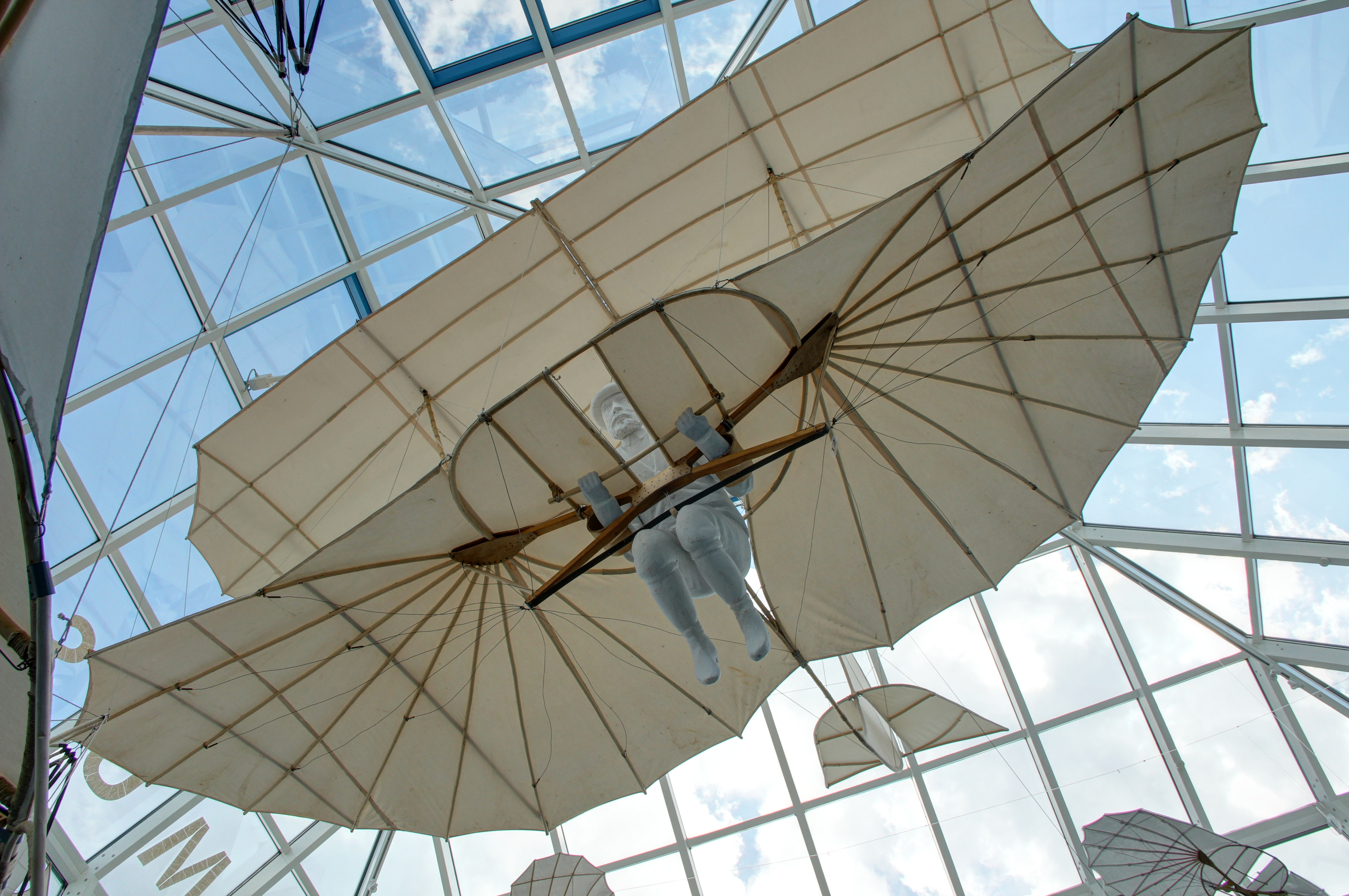 Rekonstruktion des Großen Doppeldeckers von Otto Lilienthal im Otto-Lilienthal-Museum